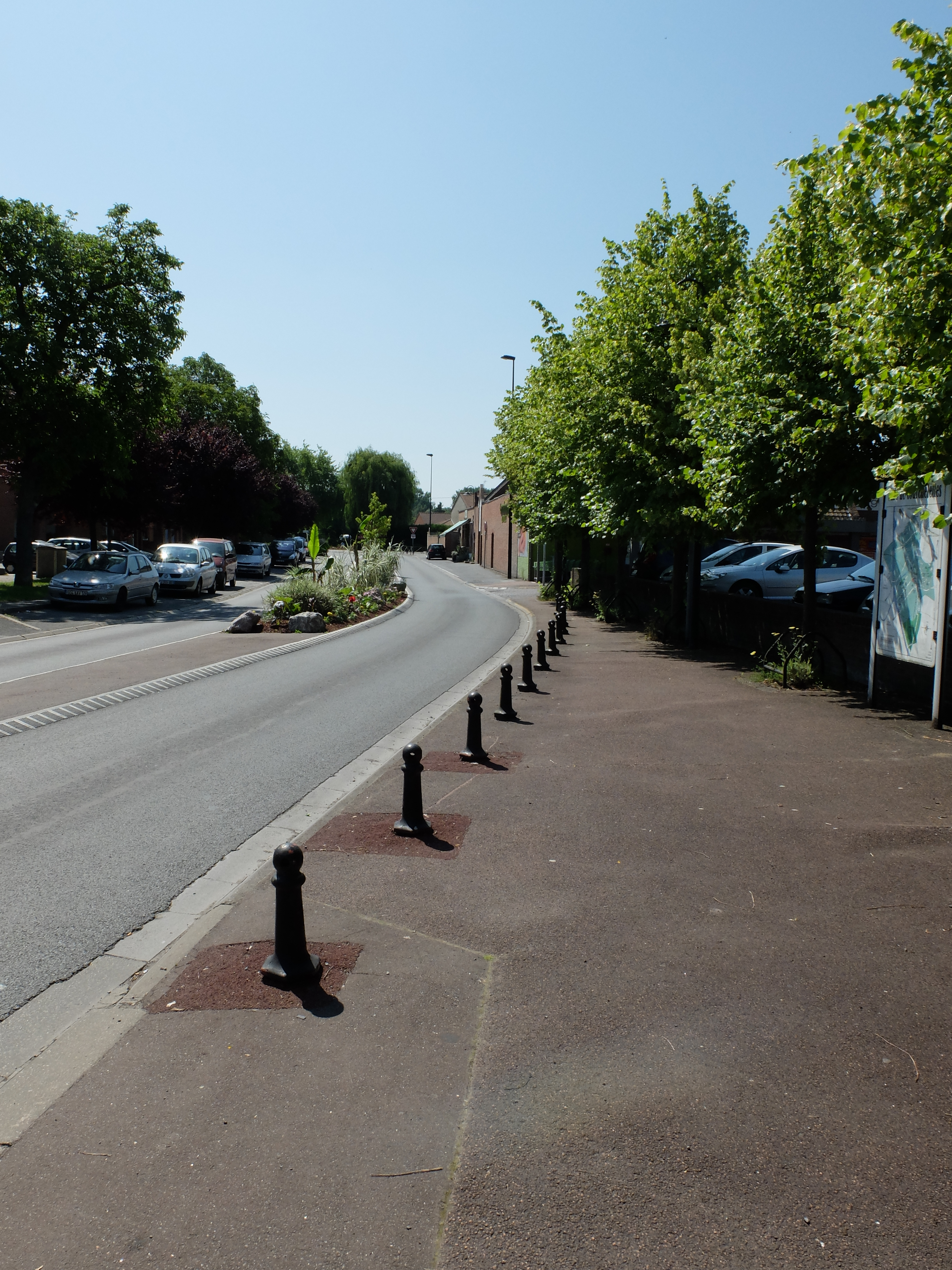 Vue de la rue Fernand Stassin de Courchelettes.